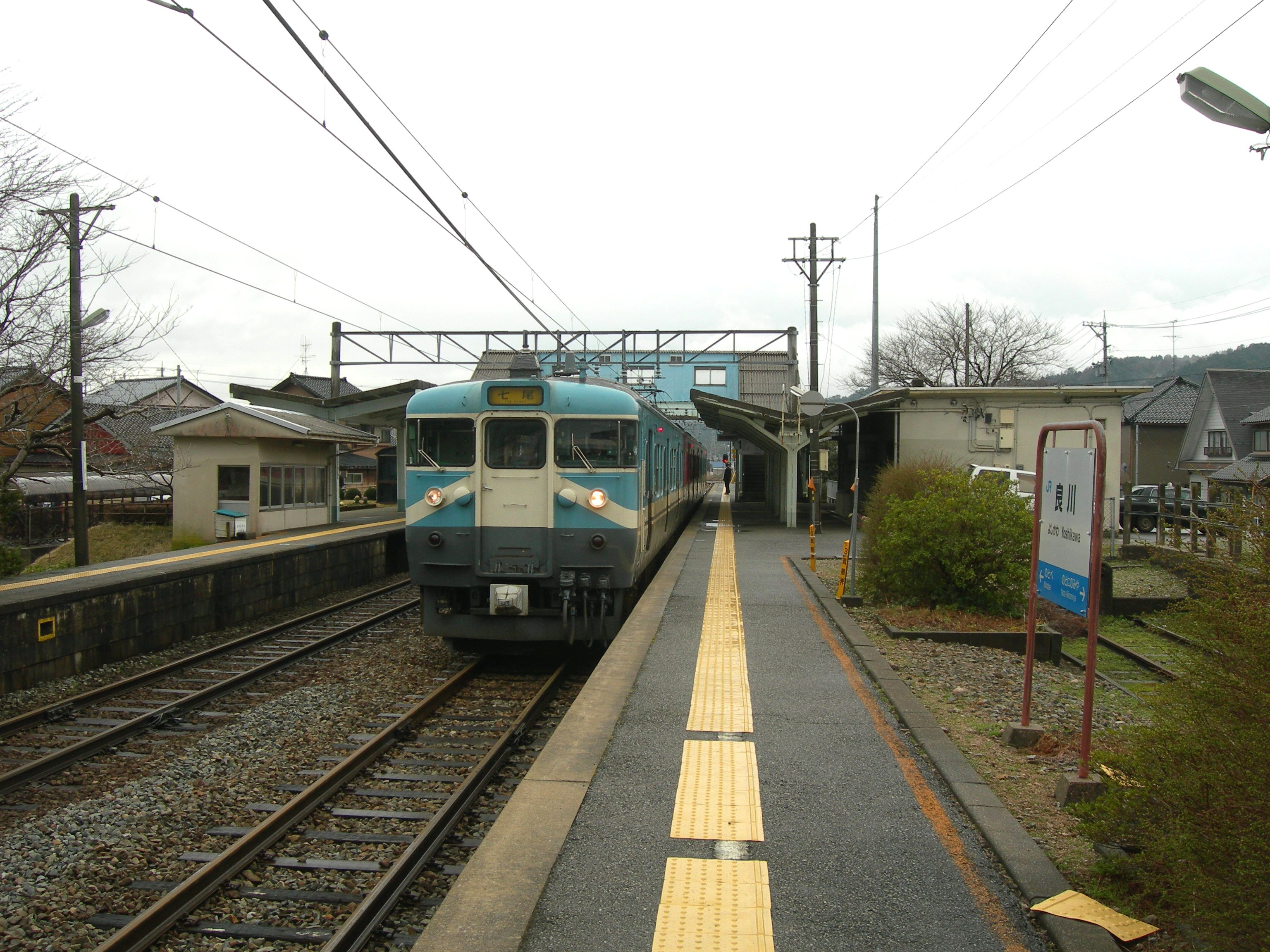 JR西日本 良川駅ホーム